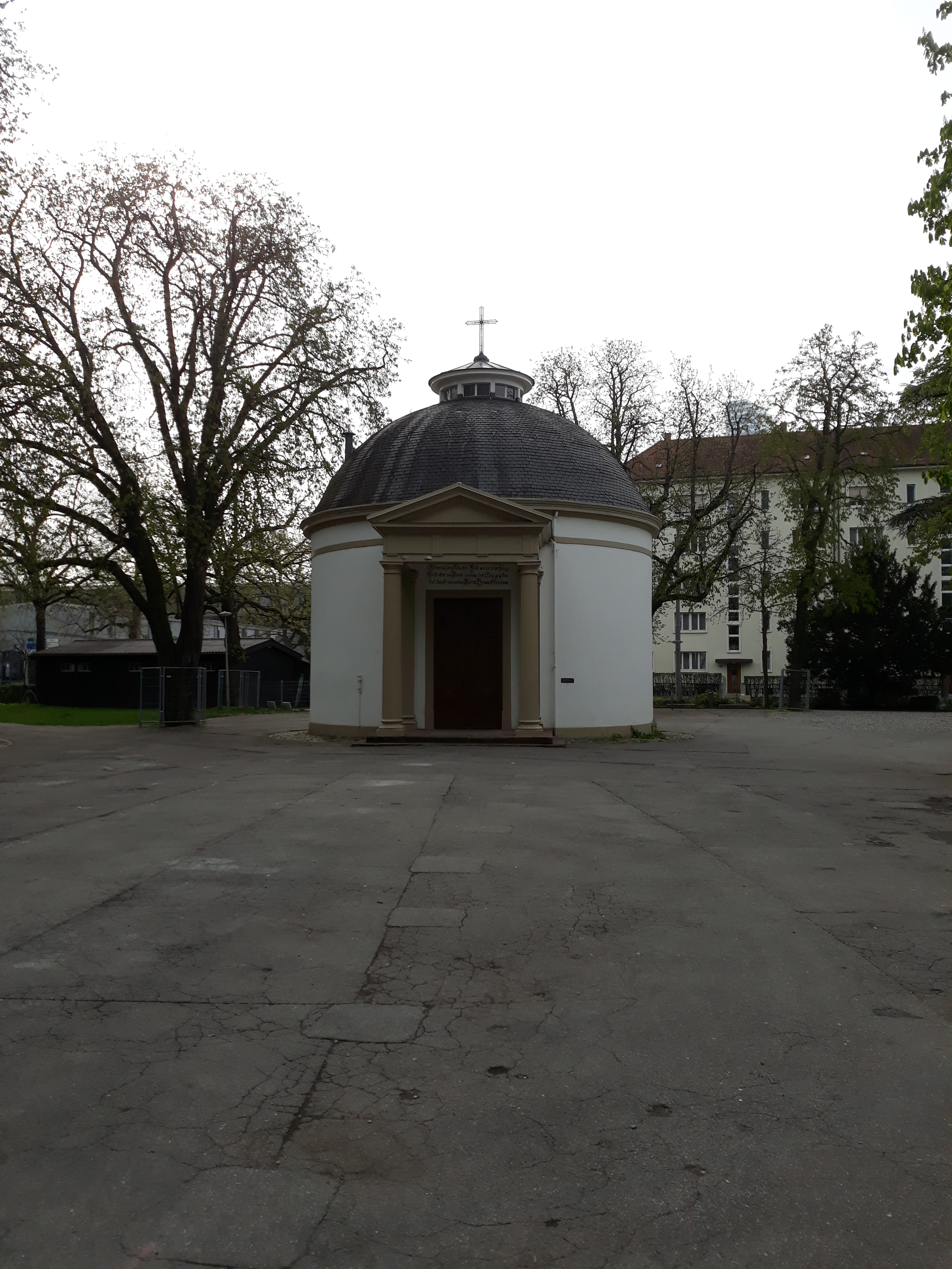 Die ehemalige Abdankungshalle des Basler Friedhofs St. Theodor, 1832 erbaut von Melchior Berri, heute Rosentalanlage, Basel (Schweiz).